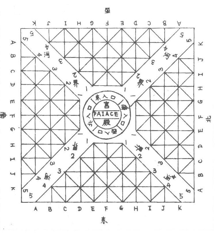 網棋的棋盤